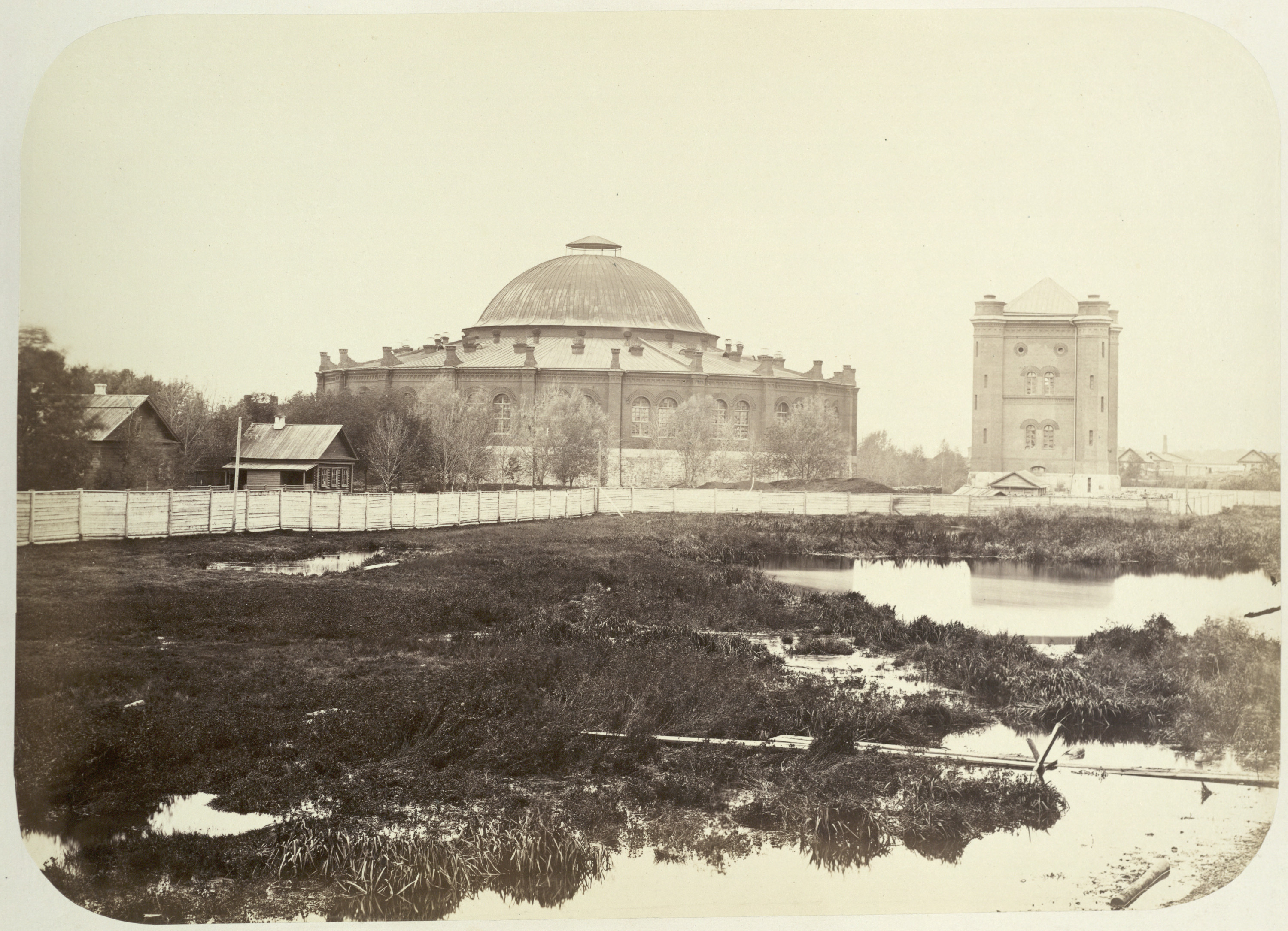 Круговое депо и водонапорная башня в Москве. 1850-е годы